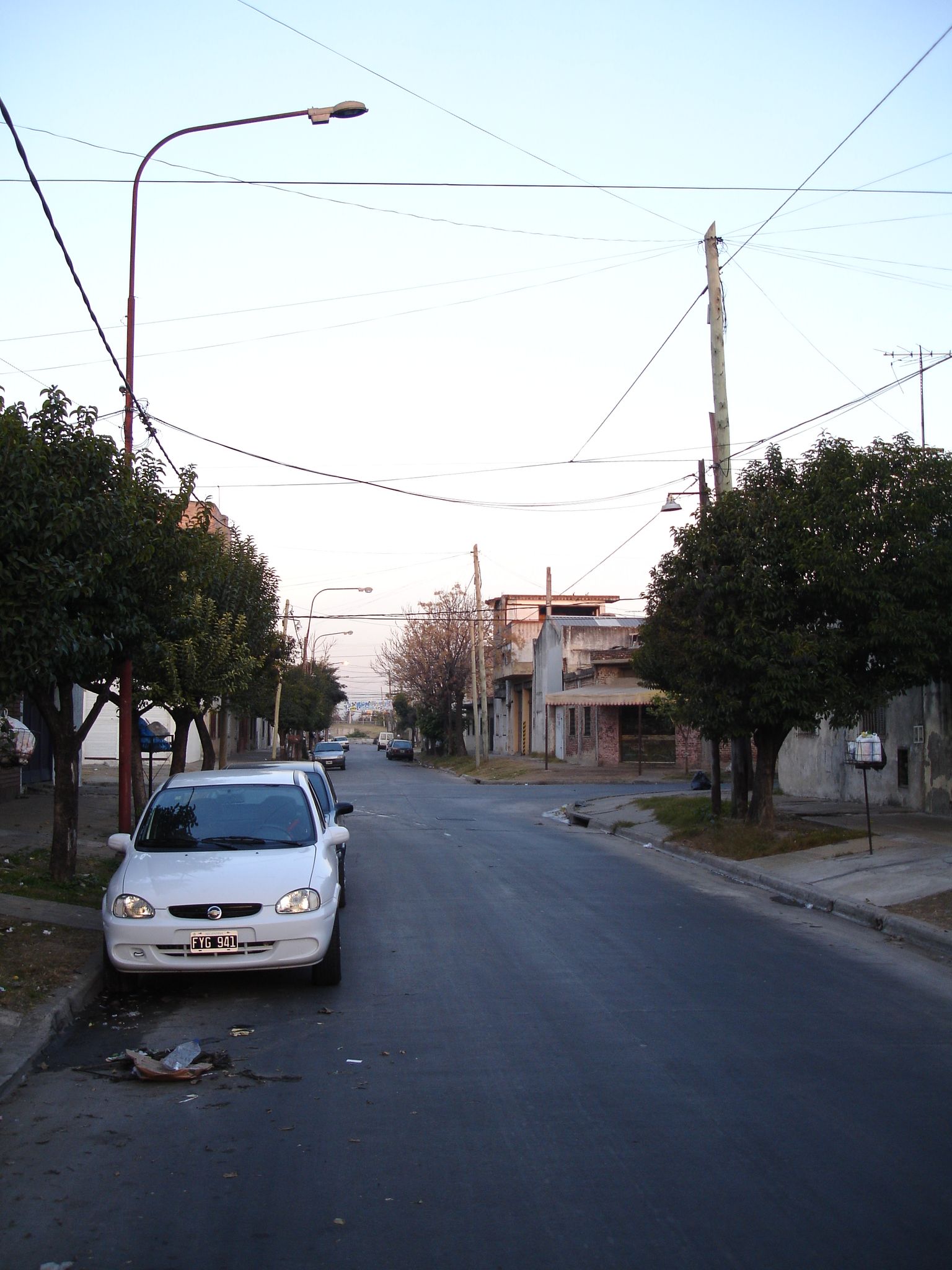 Calle de la ciudad de CIUDADELA en la Provincia de Buenos Aires, Argentina